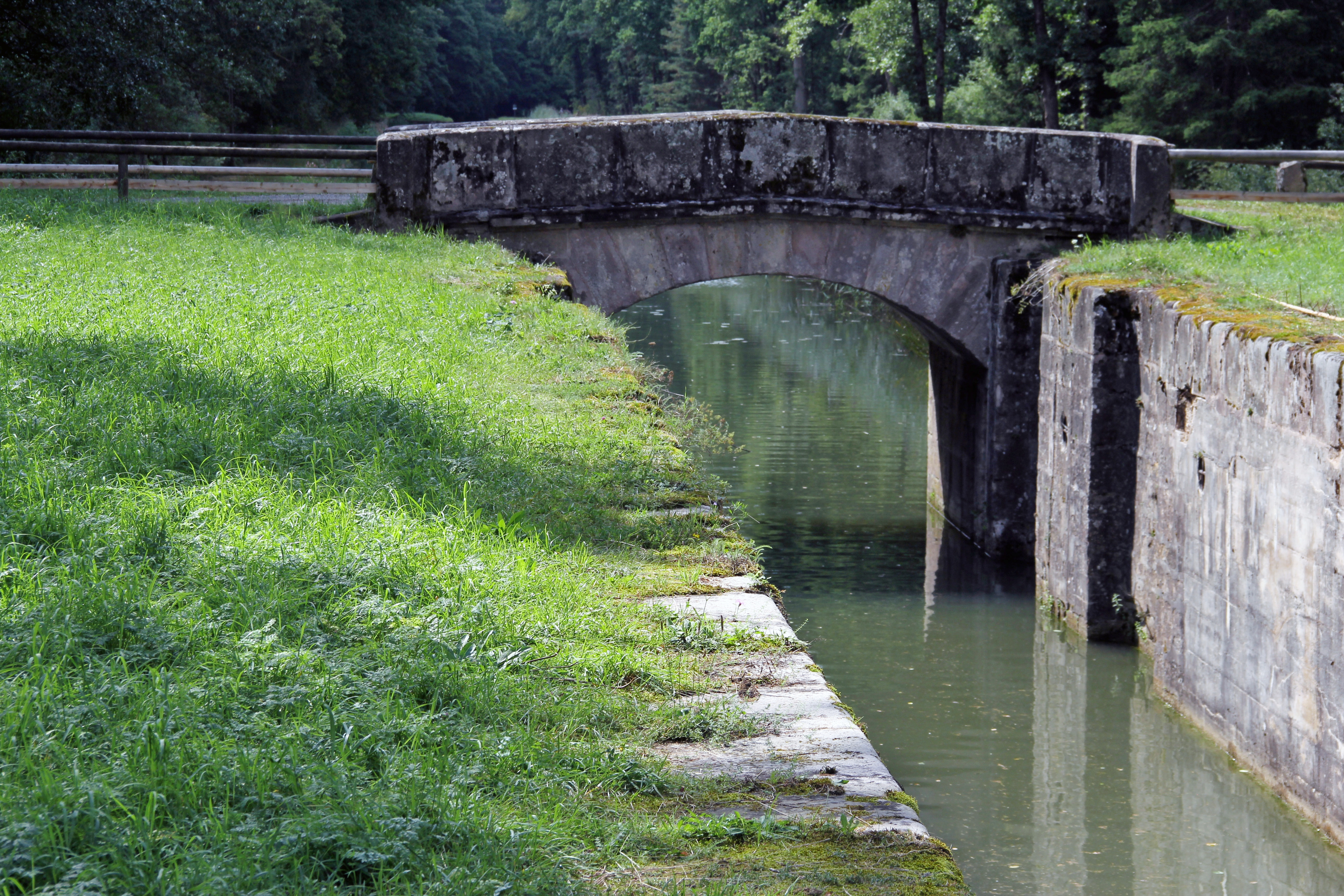 Schleuse 45, Ludwig-Donau-Main-Kanal